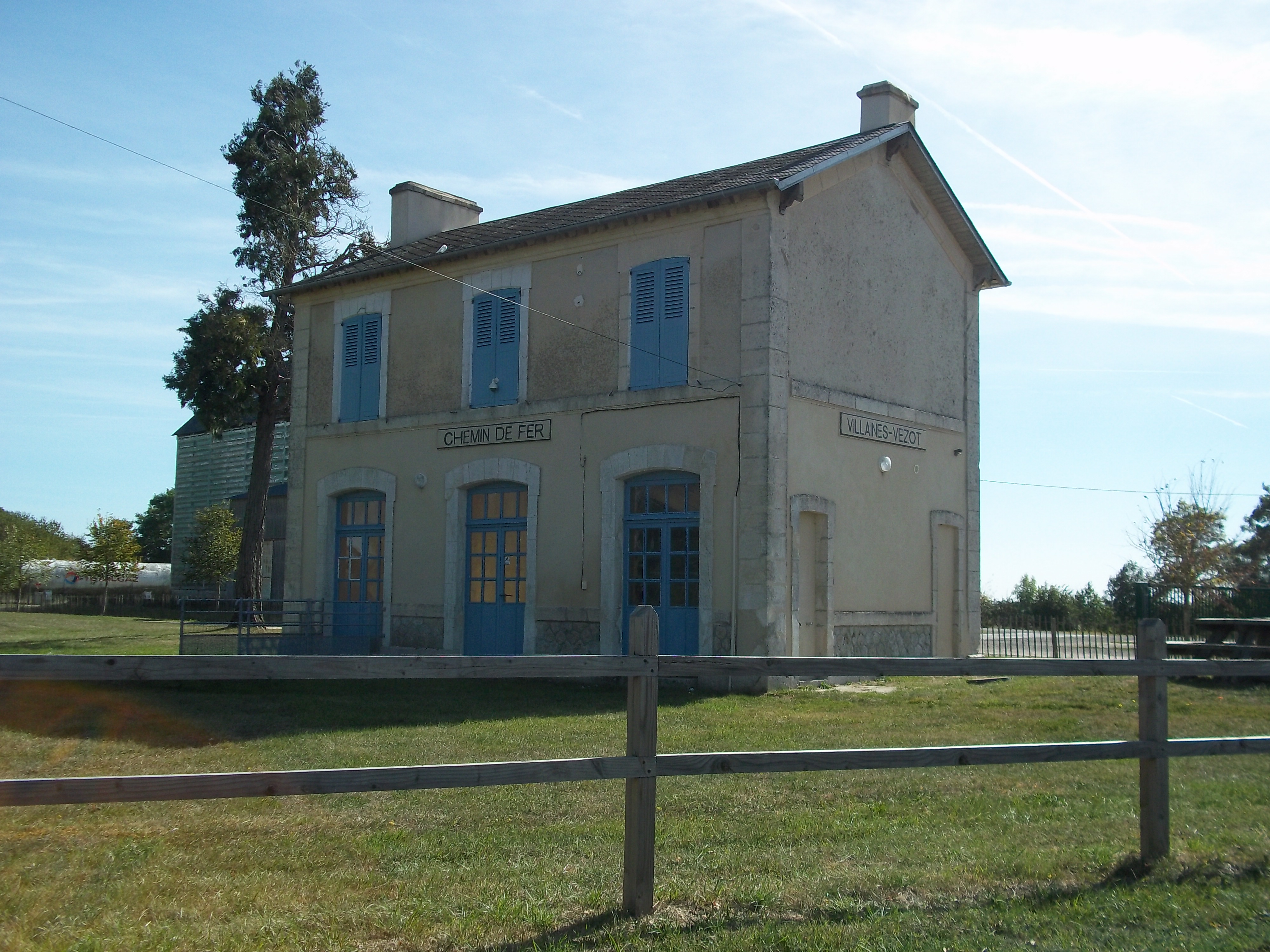 Gare désafectée de Vezot - Sarthe - France